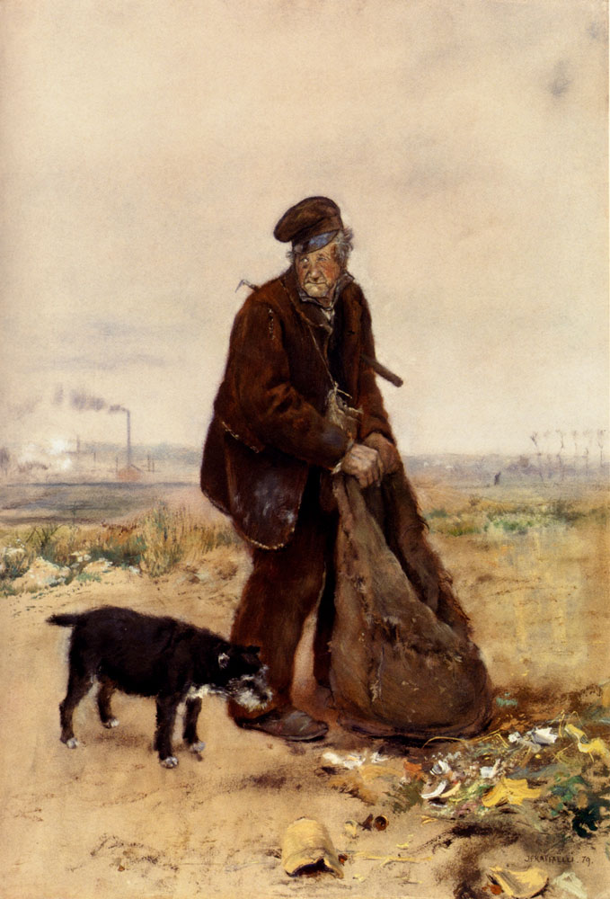 label QS:Lde,"Lumpensammler, seine Pfeife anzündend"label QS:Lfr,"Chiffonnier allumant sa pipe"